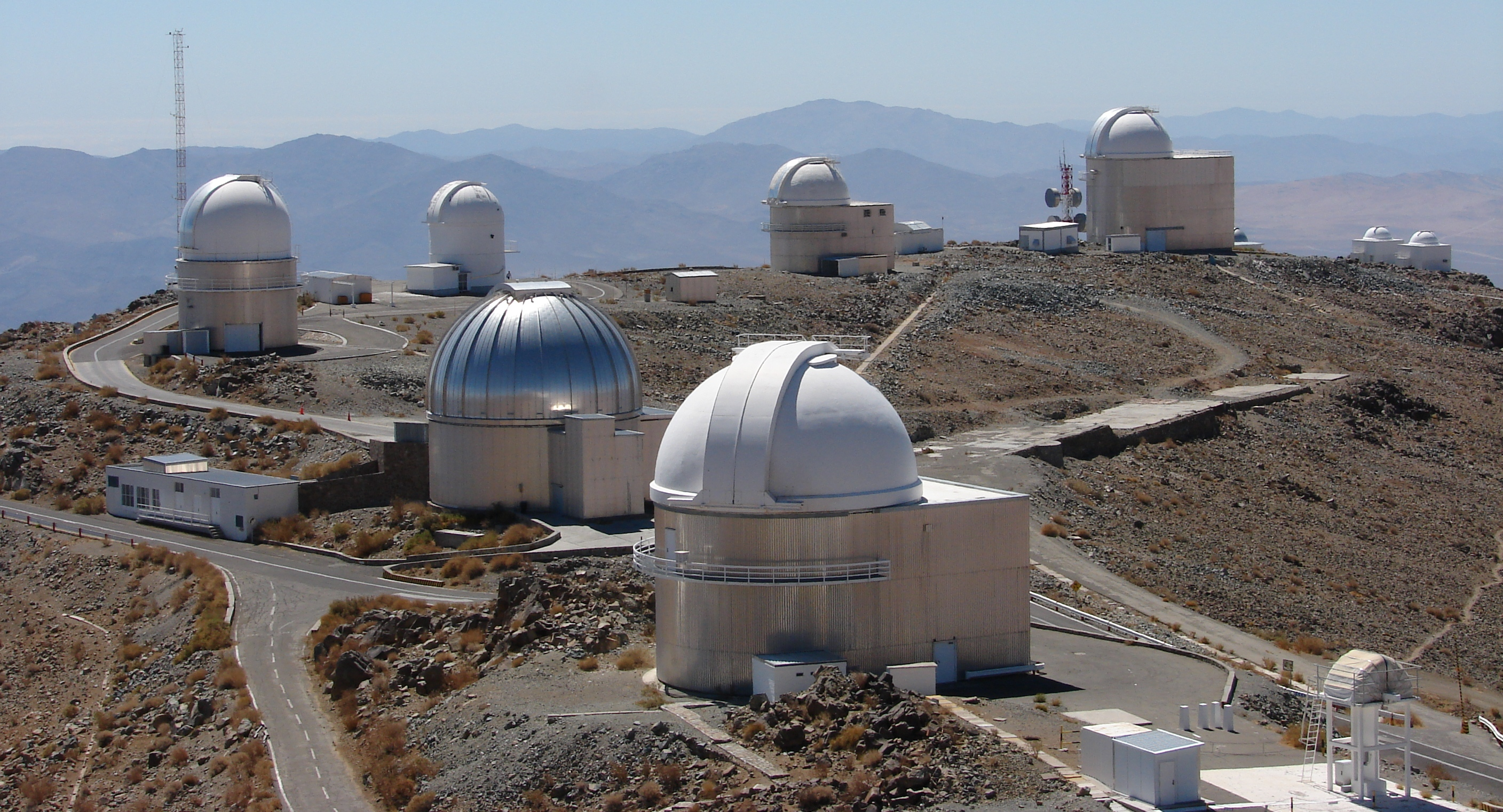 Observatorio astronomico de La Silla.